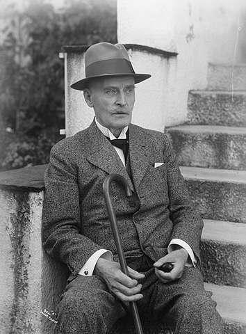 Norwegian author and Nobel Prize winner in Literature Knut Hamsun in 1936.